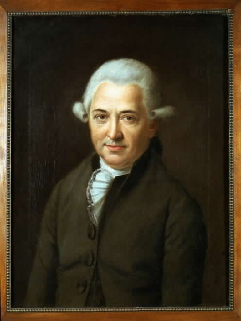 Christoph Friedrich von Pfleiderer, Tübinger Professor für Mathematik und Physik 1781-1821